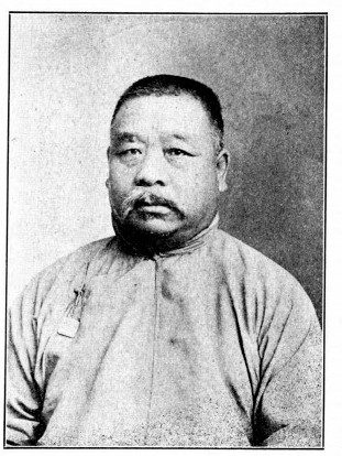 中文（台灣）: 王沚清議員